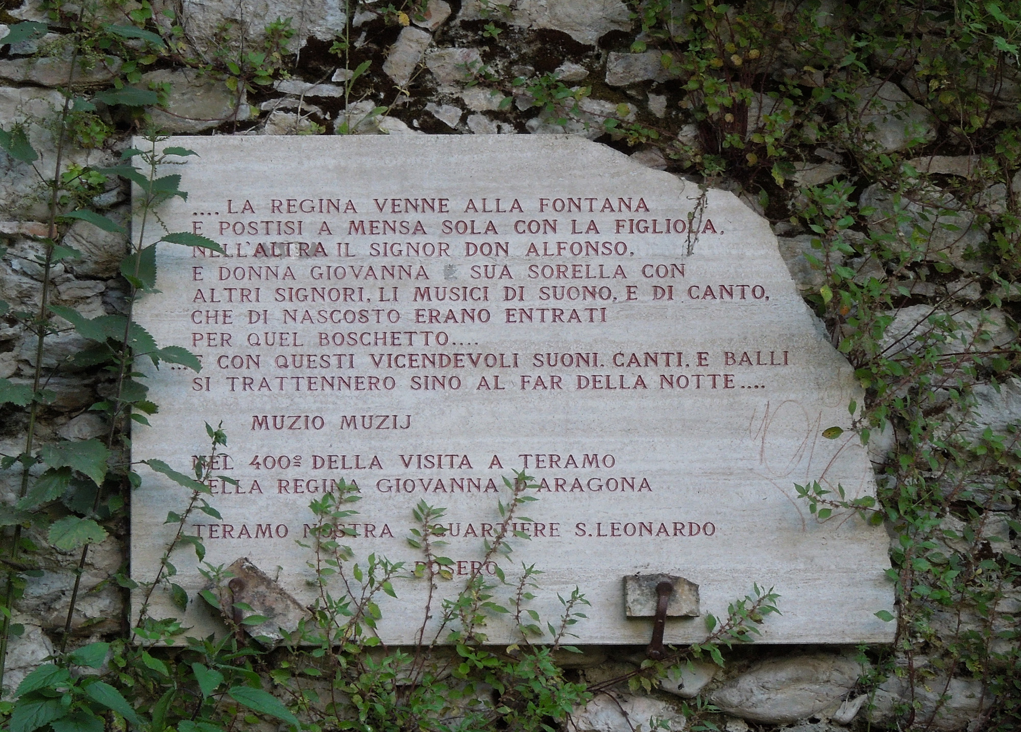 Lapide commemorativa, con incise le parole dello storico Mutio de Mutji, posta su una parete di Fonte della Noce di Teramo per la commemorazione dei 400 anni trascorsi dalla visita della regina Giovanna d'Aragona, vedova di Ferdinando I.